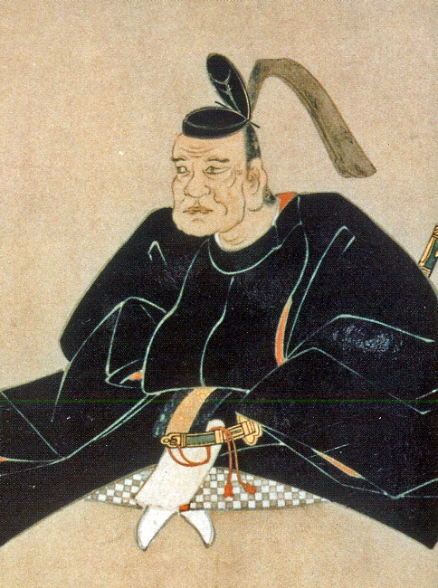 仙台藩主伊達忠宗の肖像画。